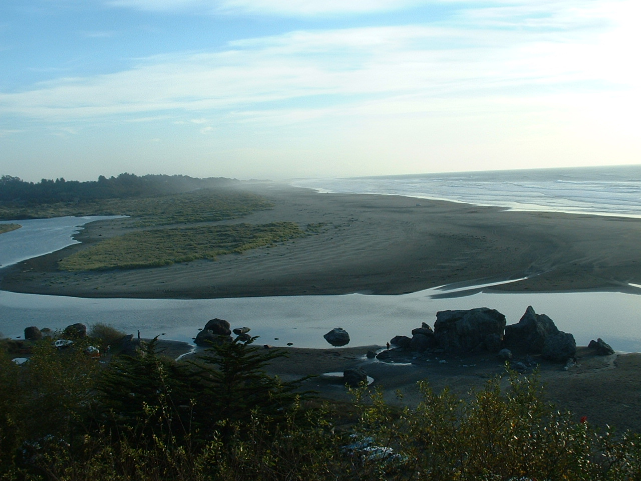 Arcata, California